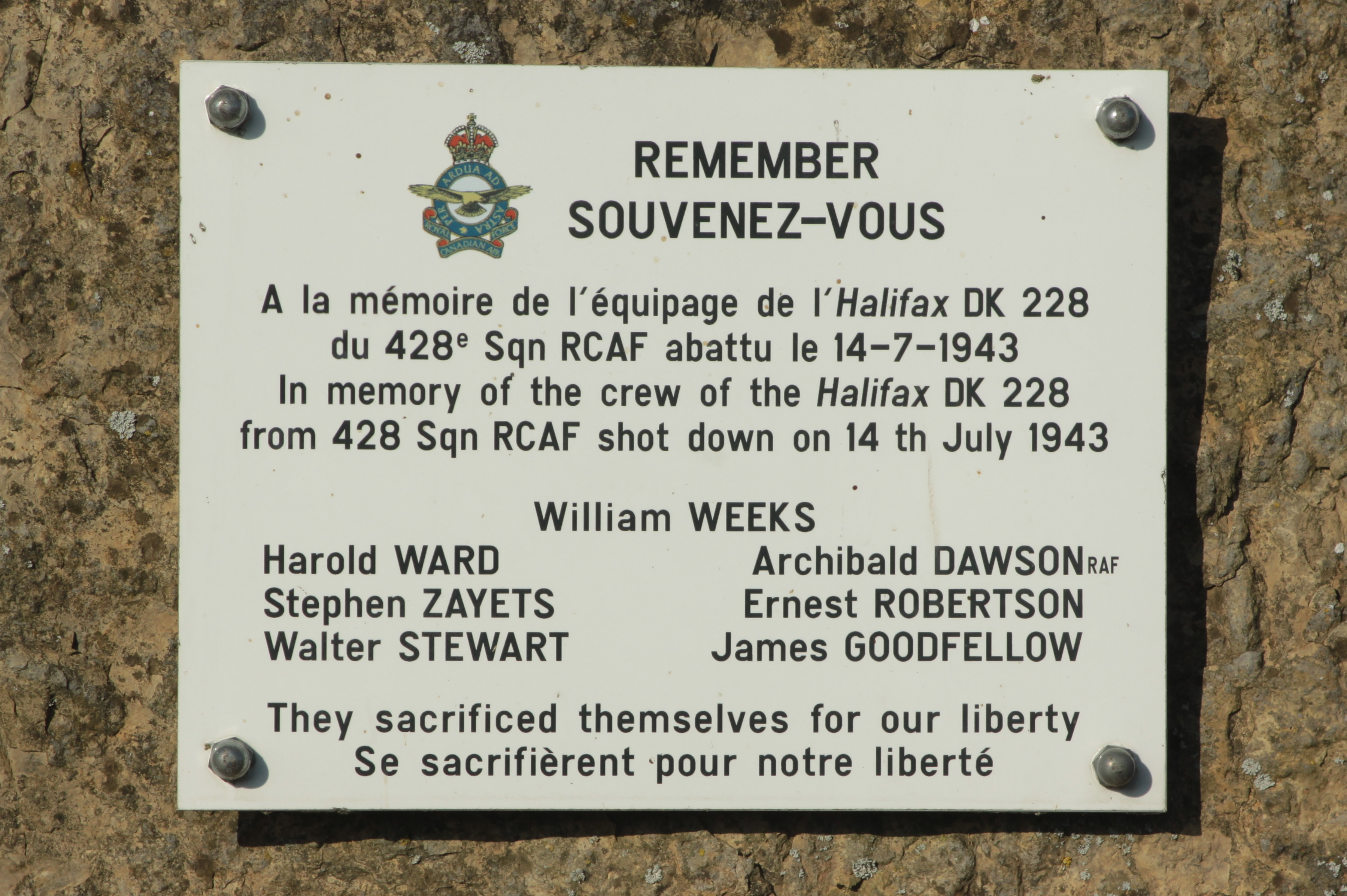 Plack mat den nimm vun den Aviateuren déi beim Crash vum Halifax bei Hulsonniaux ëm d'Liewe koumen